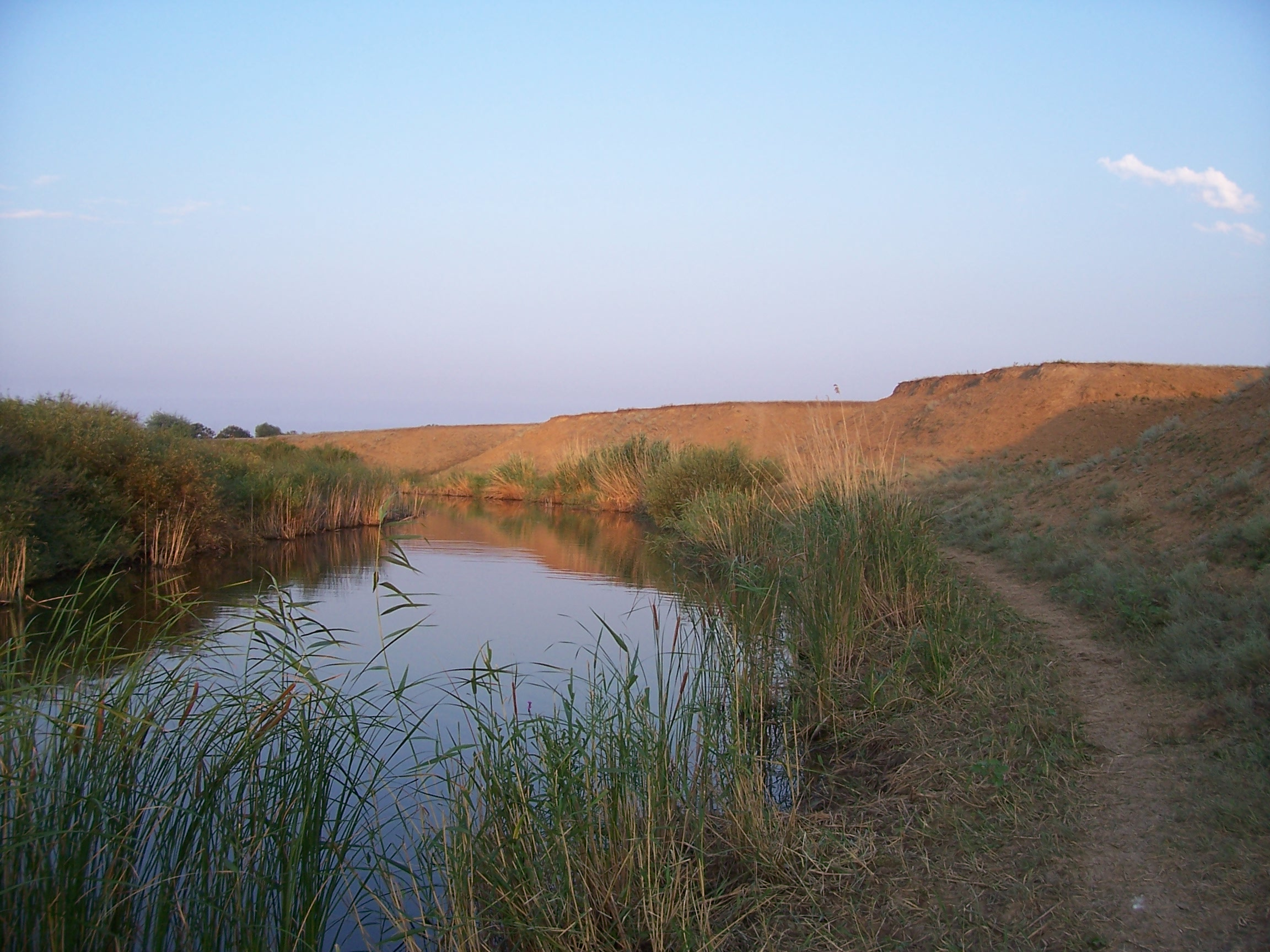 река Отрожина в районе села Харьковка Старополтавского района